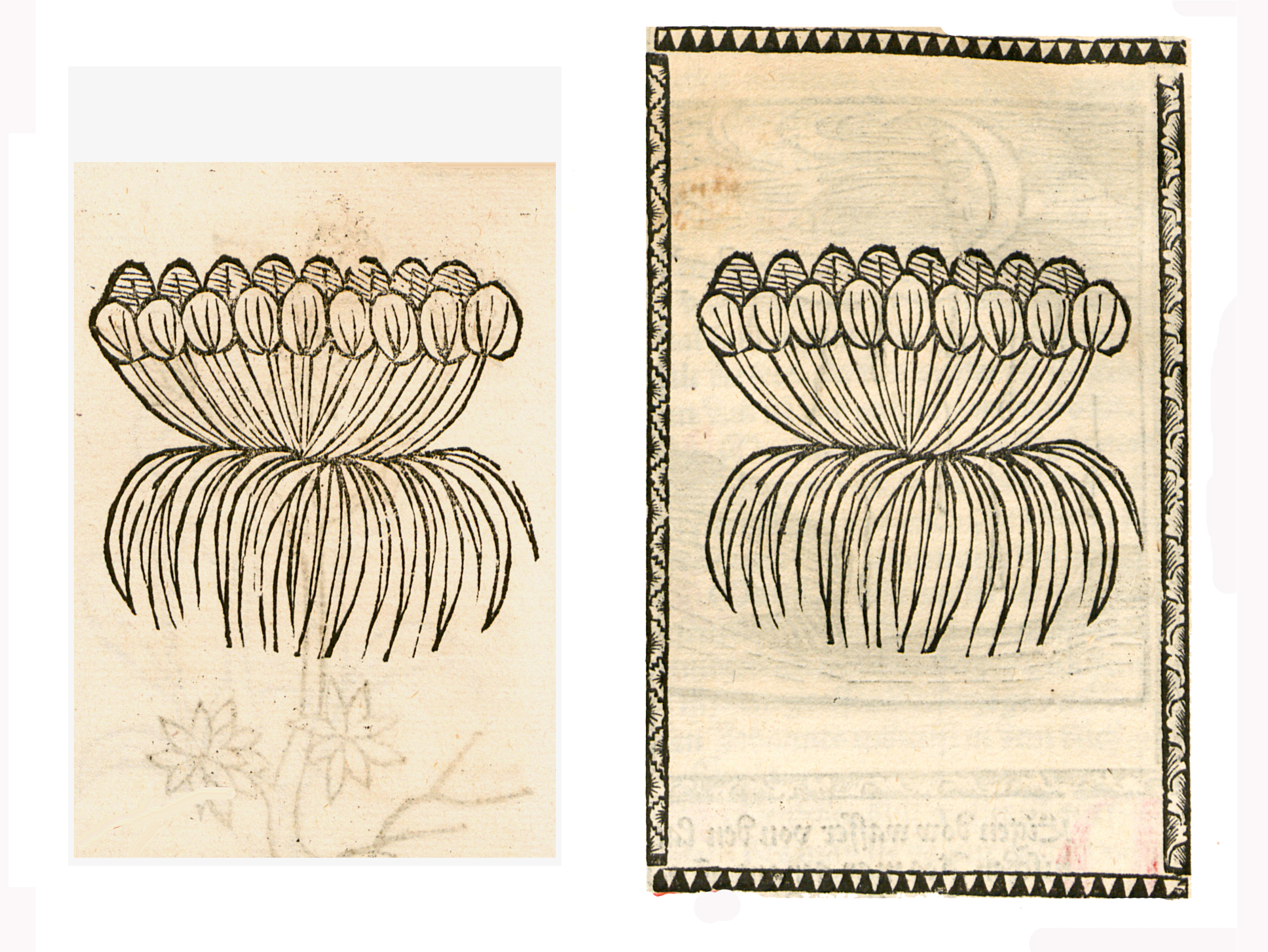 Abbildung von: Merlinsen (Lemna minor)